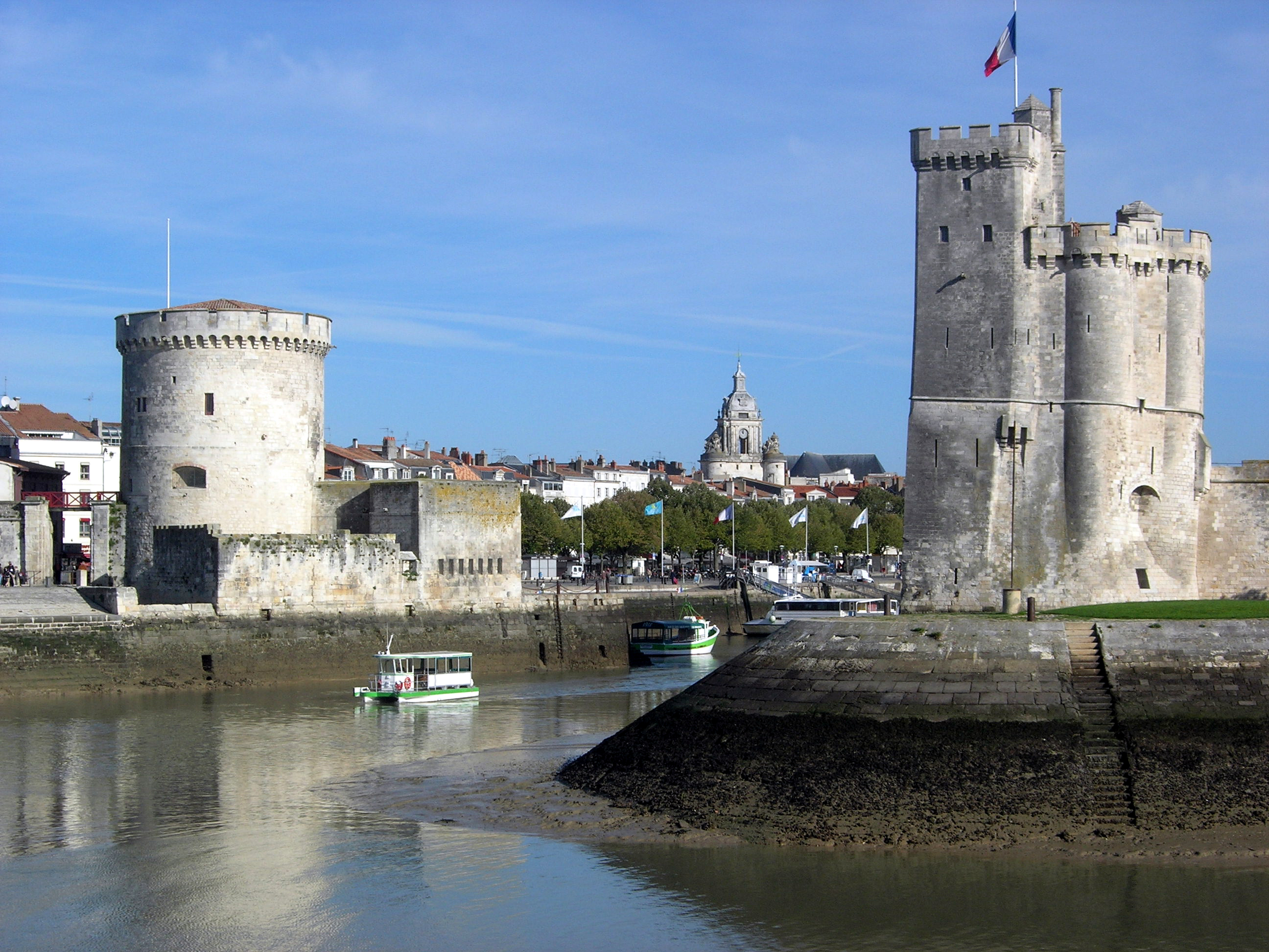 Description =Entrée du vieux port de la Rochelle Source =Photo taken by Remi Jouan Date =Octobre 2006 Author =Remi Jouan